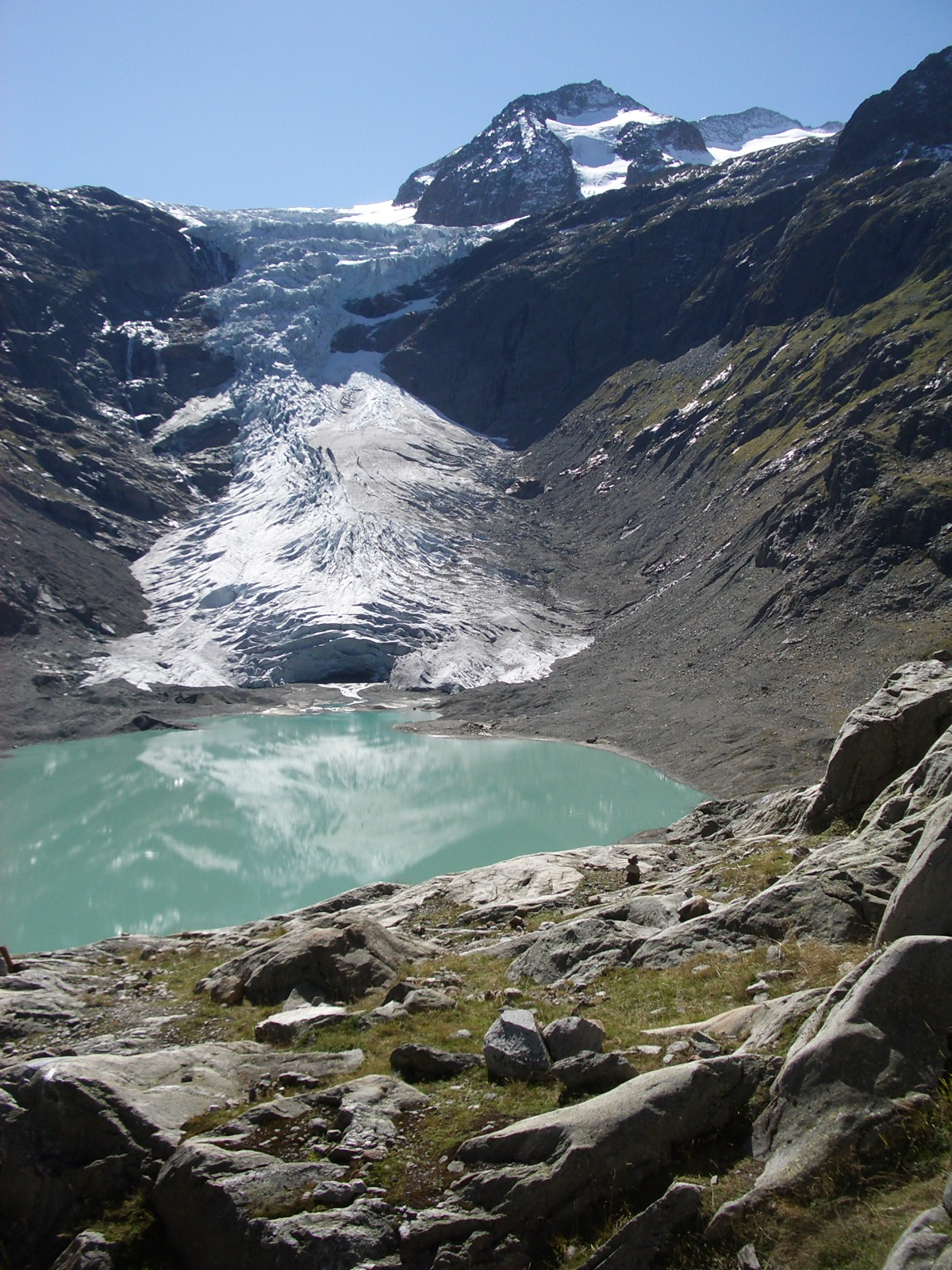 Triftgletscher BE, Switzerland